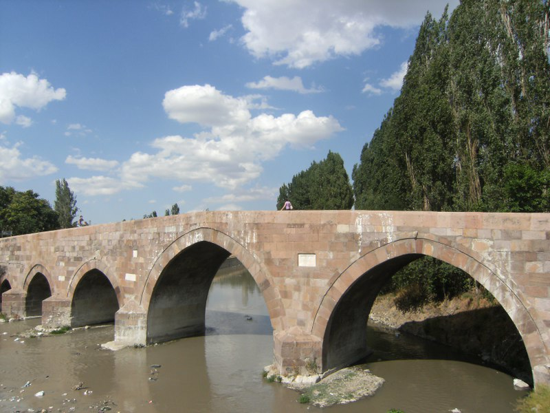 Akköprü, Ankara